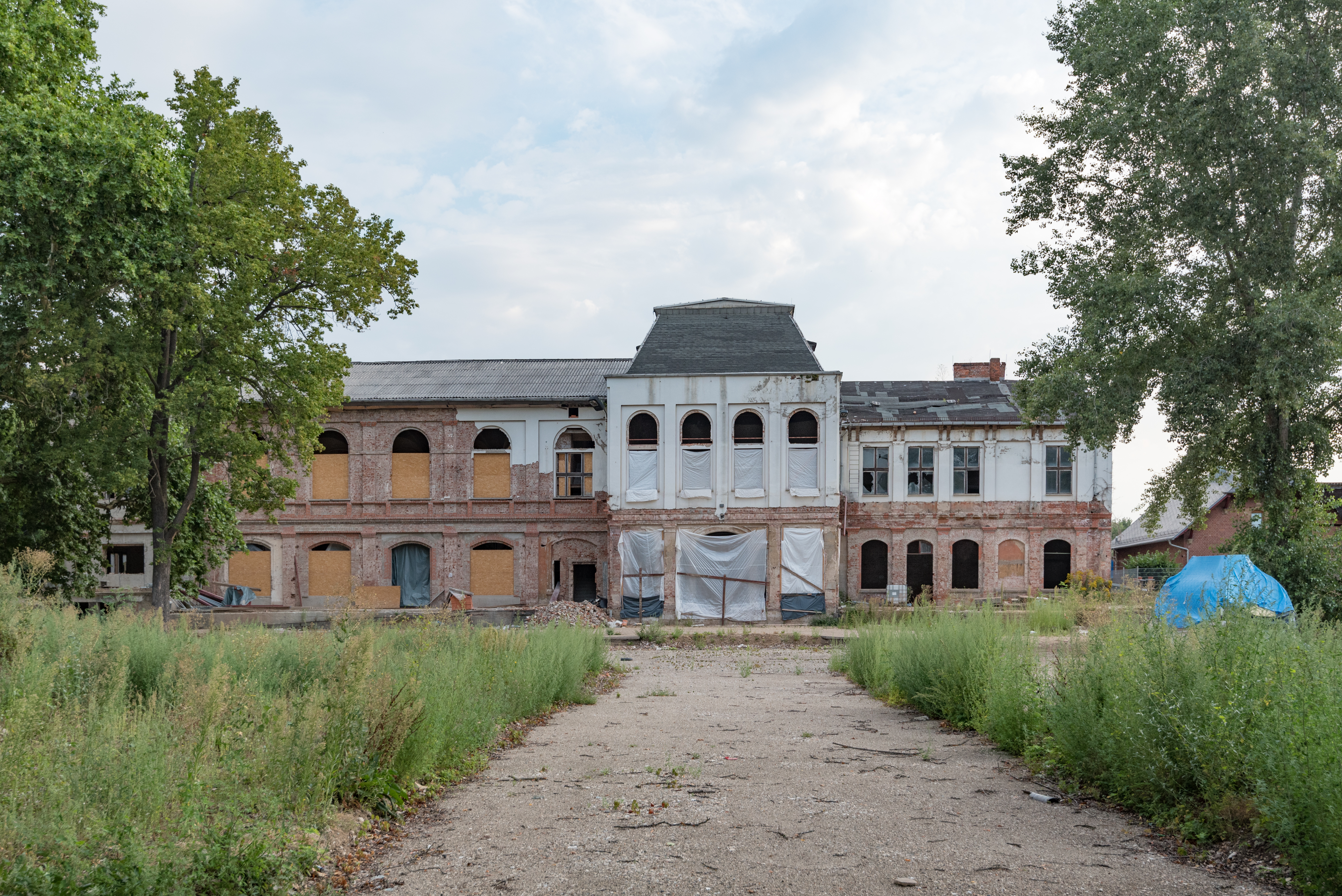 Weißenfels, Am Bad, Ehemaliges Gesellschaftshaus